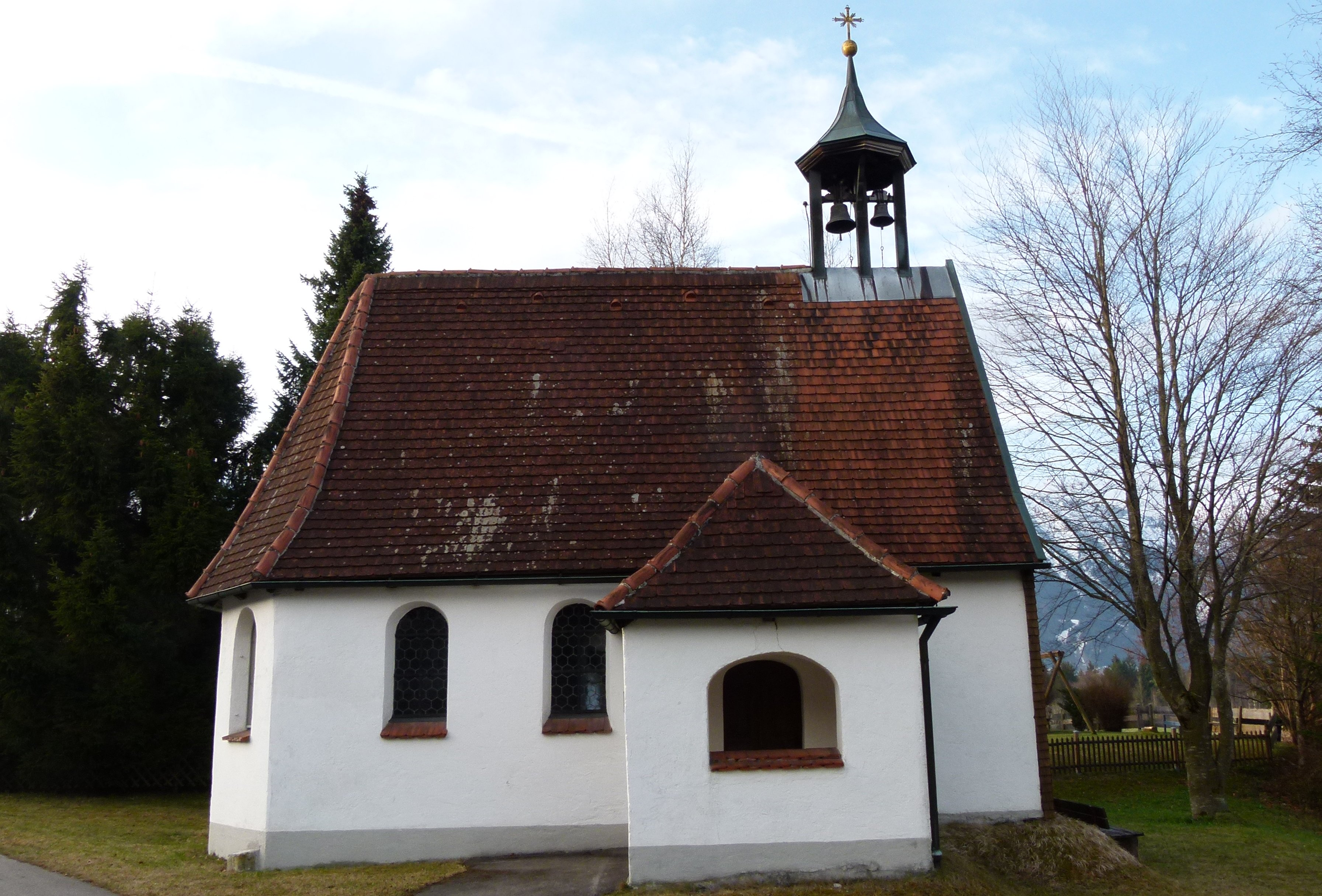 Kapelle Hl. Kreuz in Pfronten-Kreuzegg